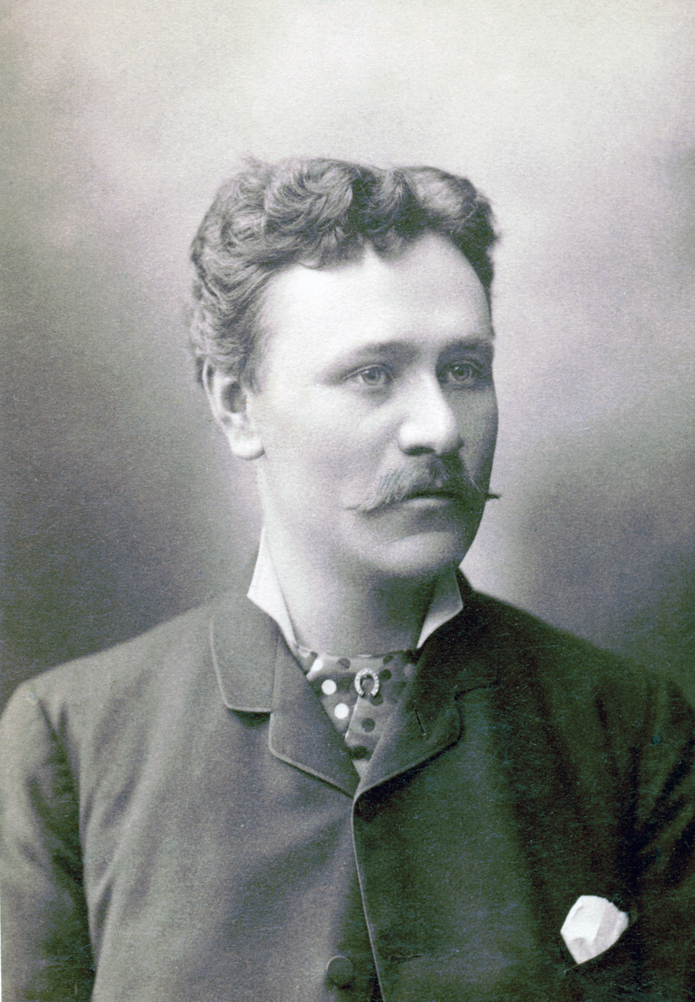 Otto Elg Lundberg, skådespelare vid Nya teatern 1887